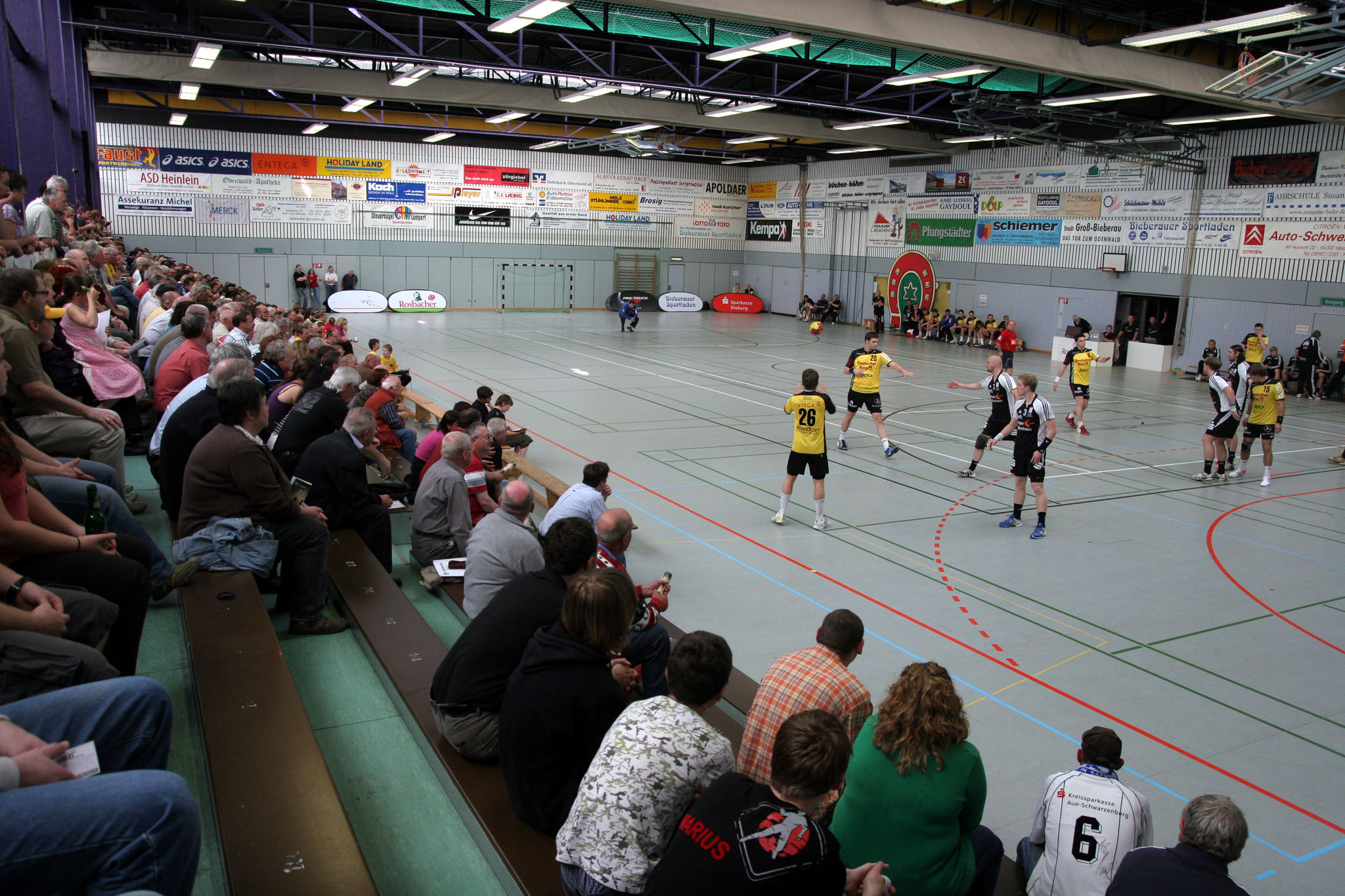 Die Großsporthalle Groß-Bieberau, Austragungsstätte der Heimspiele des Handball-Zweitligisten TSG Groß-Bieberau. Am 19. April 2009 währen des Spiels TSG Groß-Bieberau gegen EHV Aue.